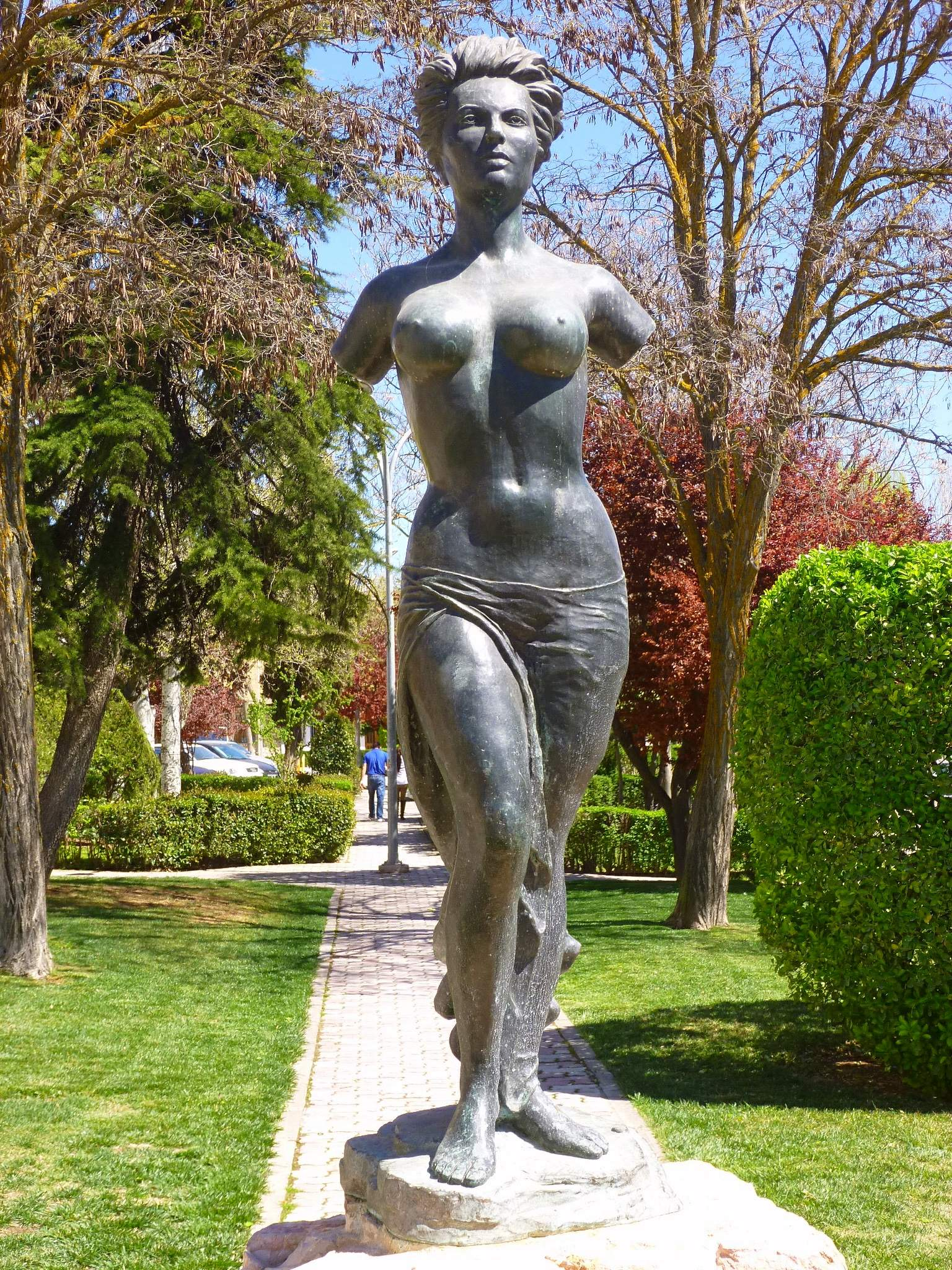 Monumento a Sara Montiel, en su Campo de Criptana (Ciudad Real) natal